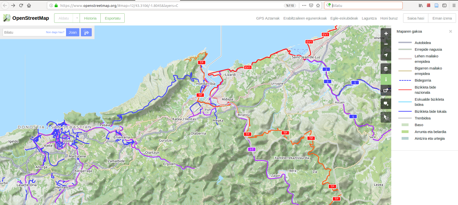 OpenStreetMap-en bizikletentzako mapa Donostia-DonibaneLohitzune-Sara-Lesaka-Andoain ingurua